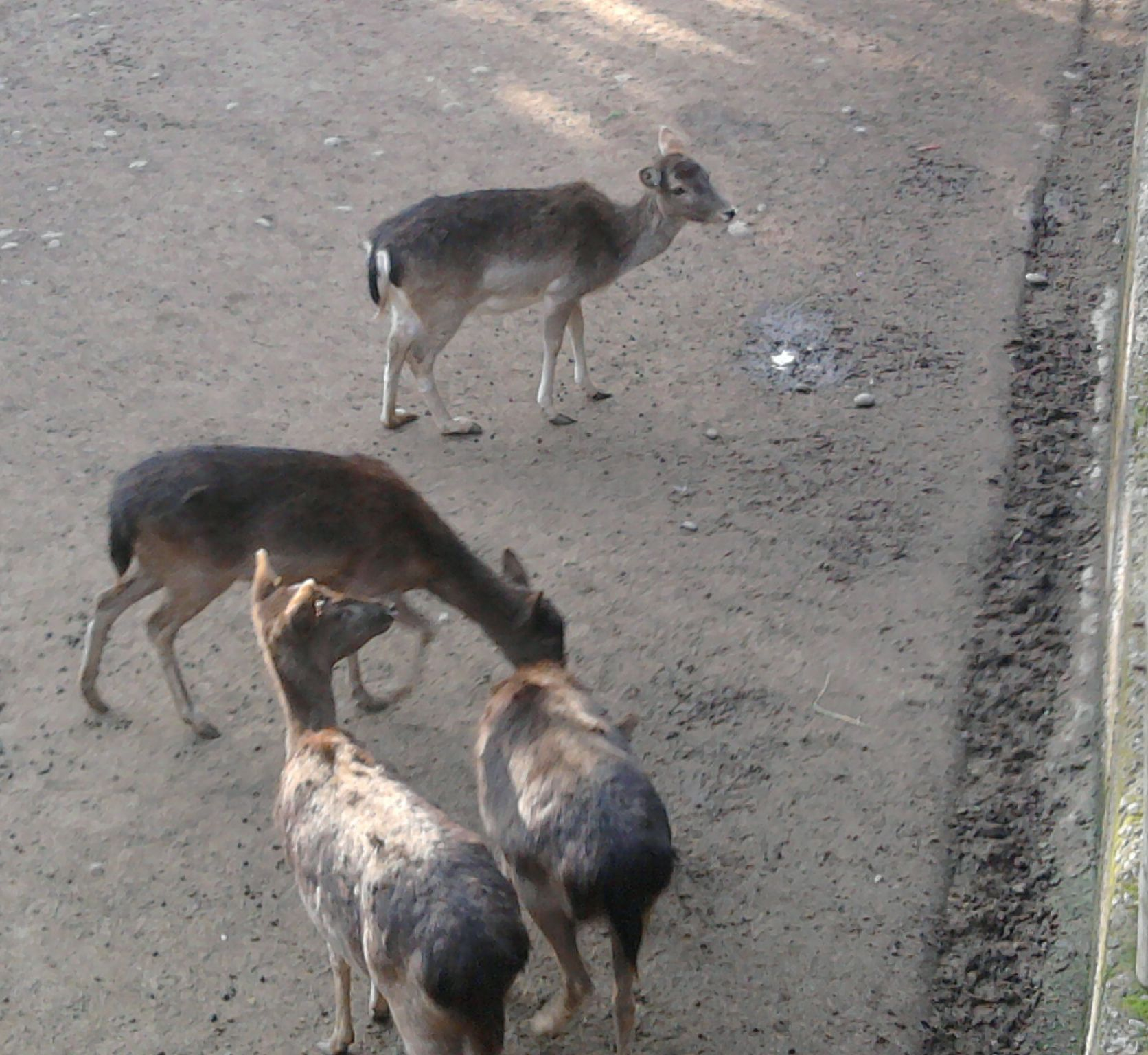 Ejemplares de ciervo rojo de Buin Zoo